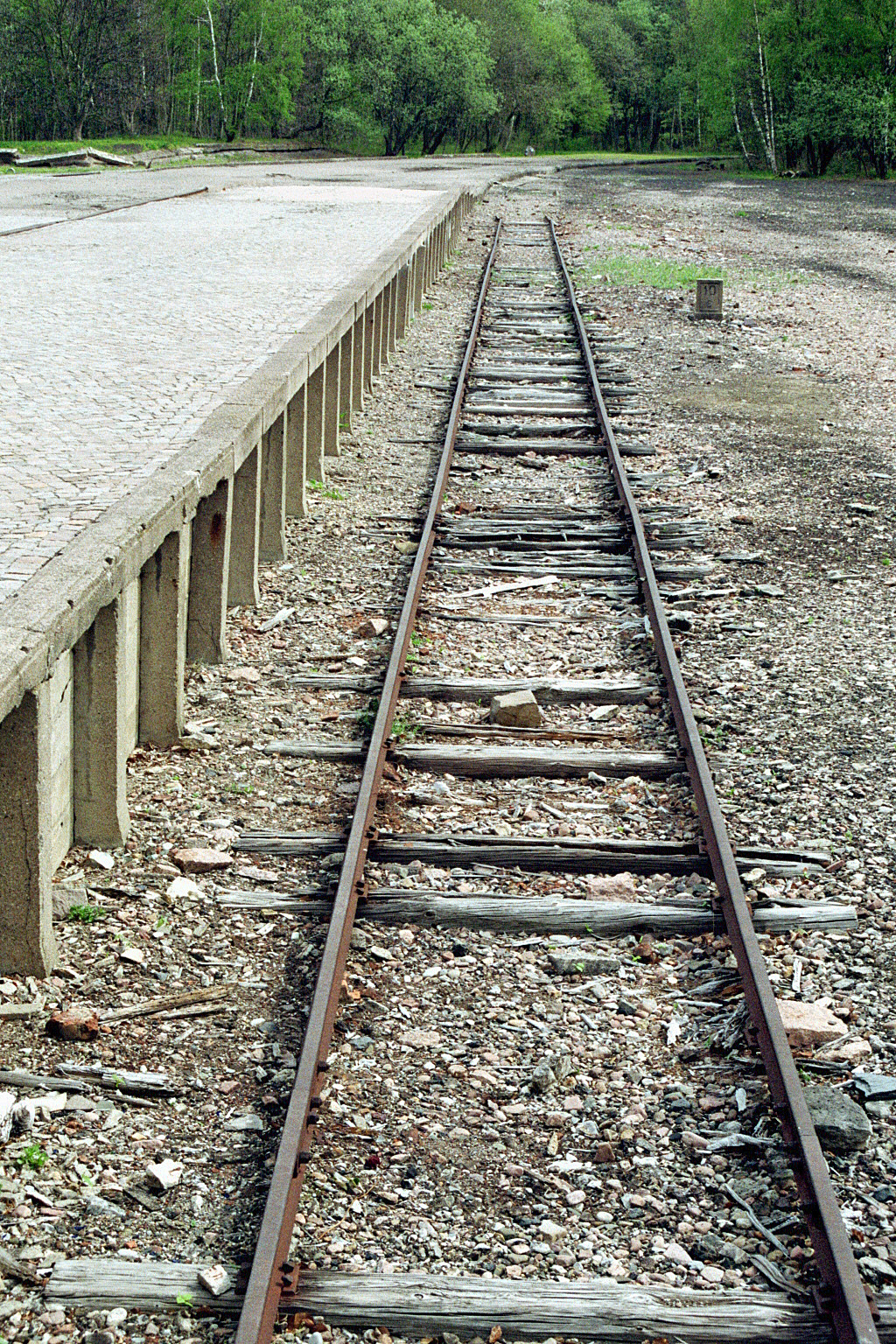 Die zuletzt für das sowjetische Sonderlager genutzte Bahnrampe. Während der NS-Zeit – seit Anfang 1944 – kamen hier u.a. die Züge mit den Lagerinsassen an. Von hier aus gingen auch Züge nach Auschwitz ab. Die zehn Kilometer lange Buchenwaldbahn wurde im Frühjahr 1943 von KZ-Häftlingen in nur drei Monaten errichtet. Sie diente zunächst der Versorgung der nebenan liegenden Rüstungsfabrik. Zustand 2012.